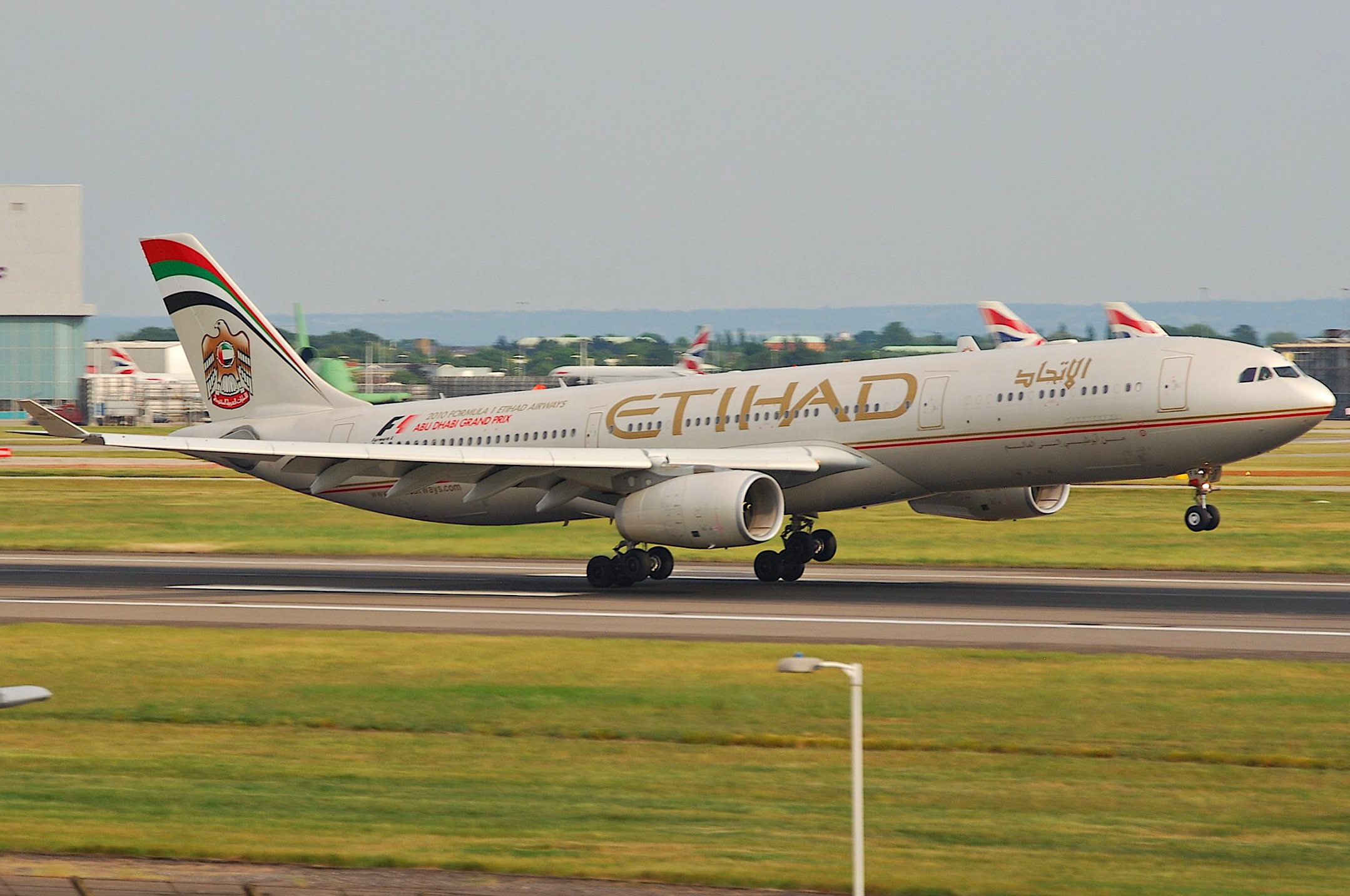 Etihad Airways Airbus A330-300; A6-AFA@LHR;05.06.2010/576ni